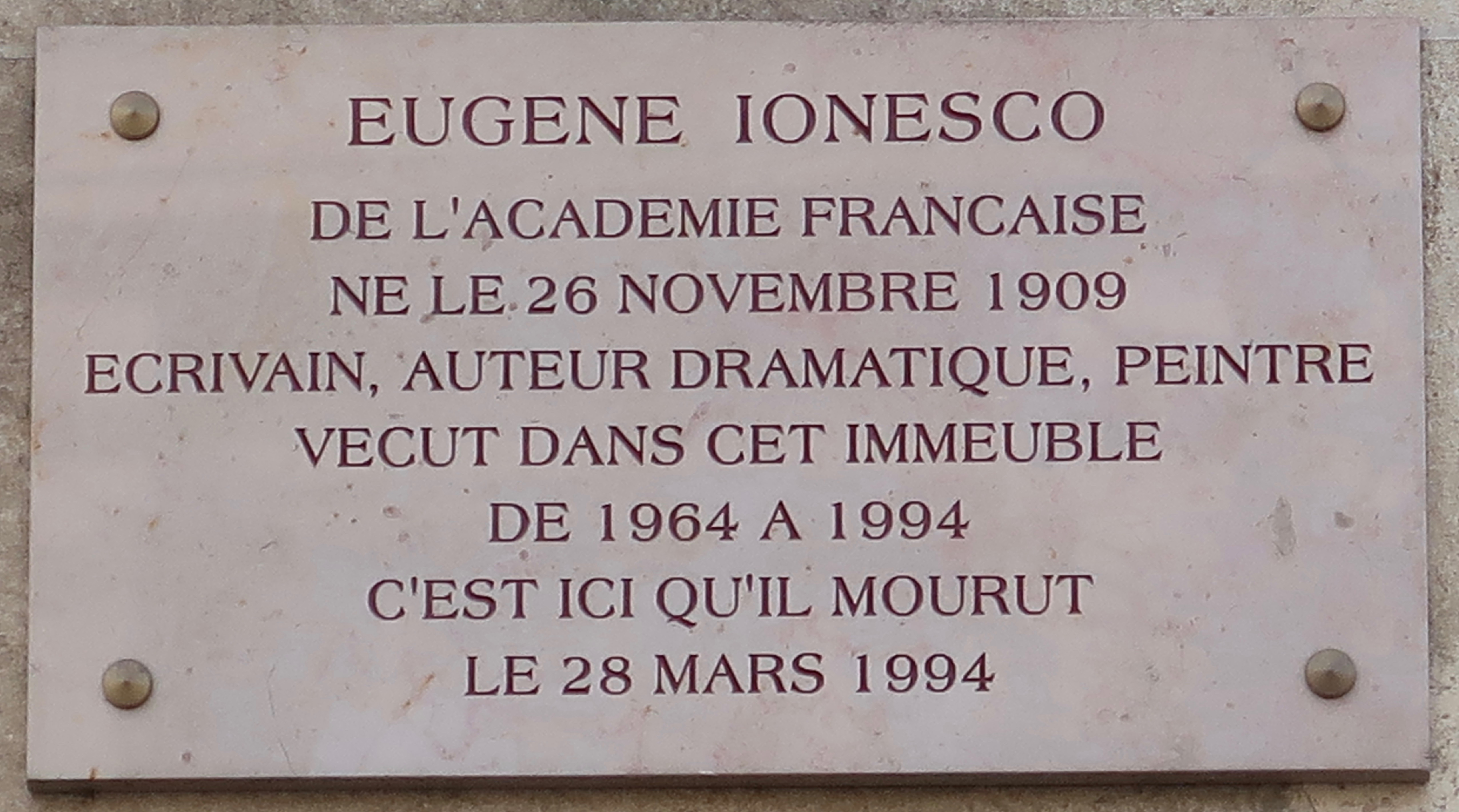 Plaque en hommage à Eugène Ionesco, 96 boulevard du Montparnasse (Paris, 14e).